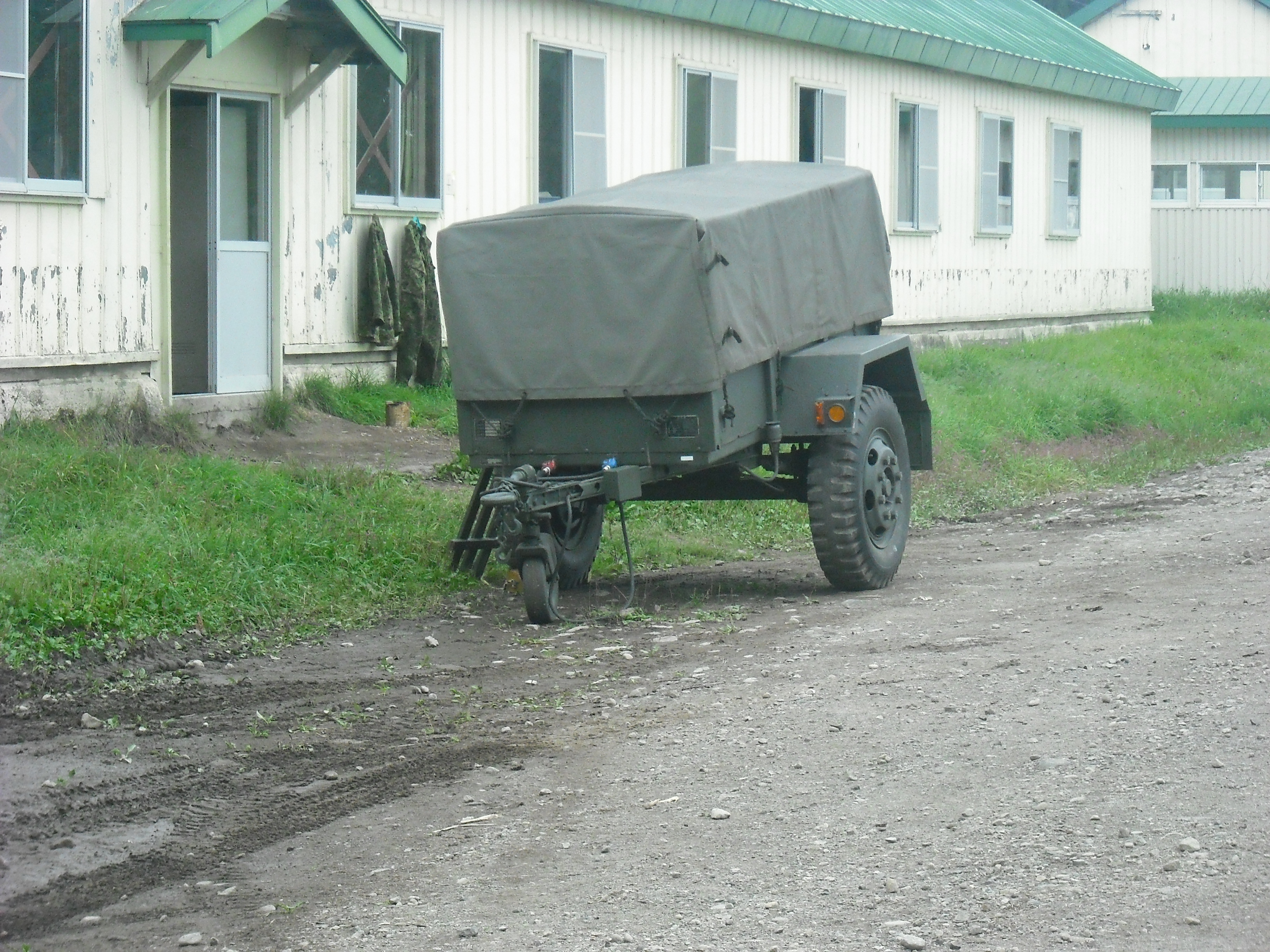 1tトレーラー（大型・中型牽引用） タイヤが73式大型初期型のタイヤを使用しているのが確認出来る